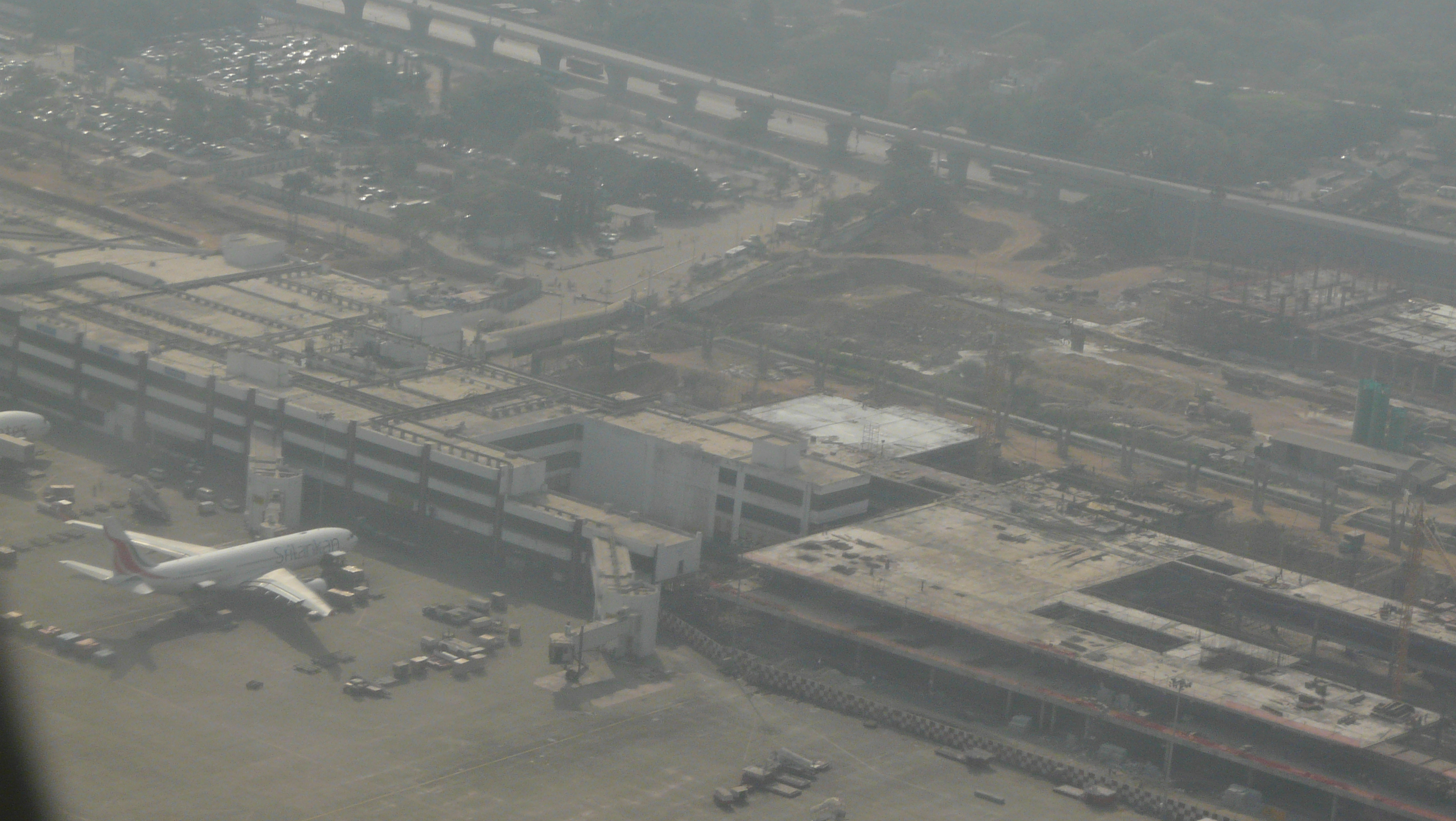 Singara Chennai